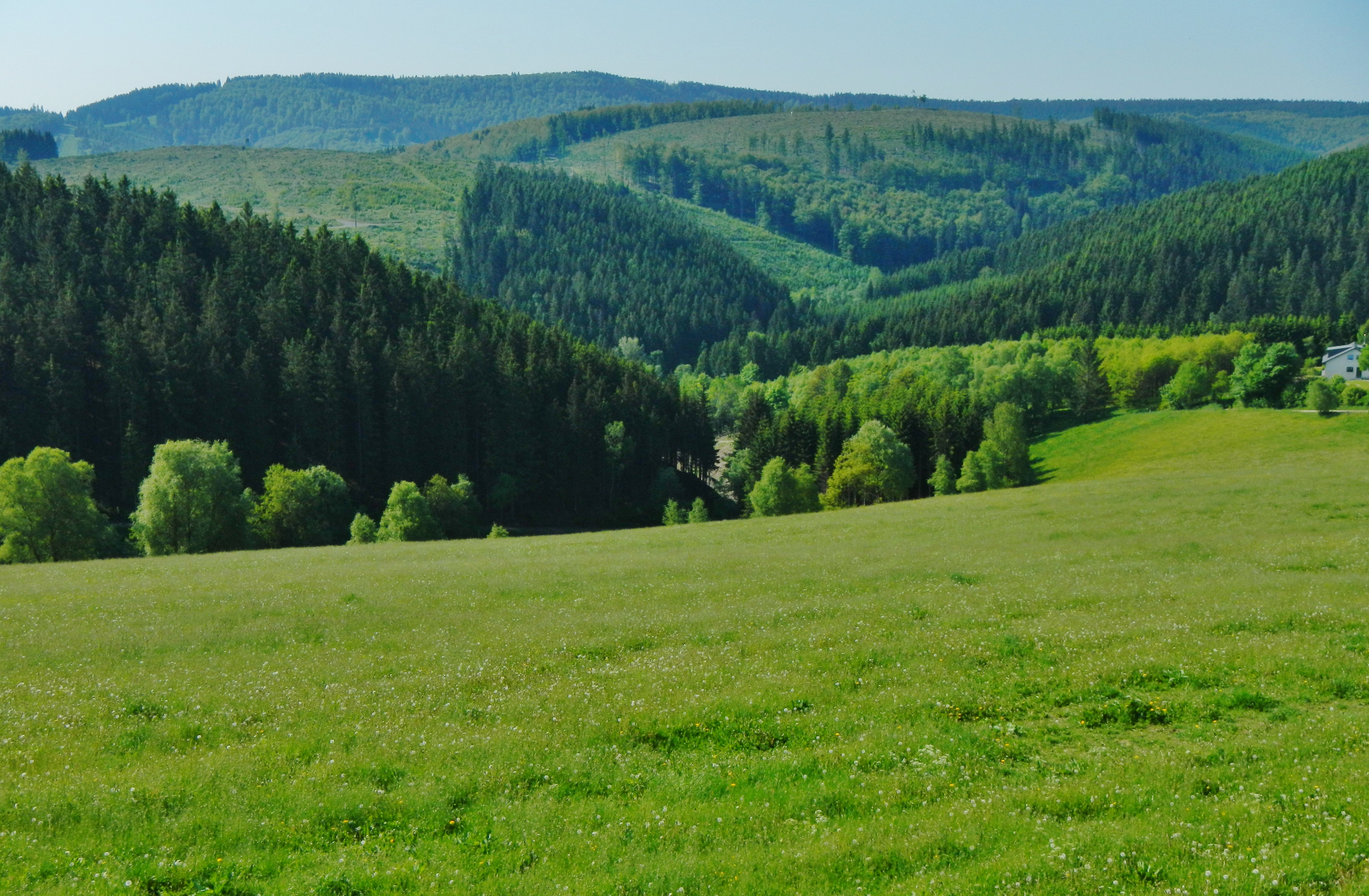 Grünland vorne gehört zum Landschaftsschutzgebiet Freiflächen und Rodungsinseln im Rothaargebirge und Wald zum Landschaftsschutzgebiet Winterberg; gesamte Fläche teil vom Naturpark Rothaargebirge